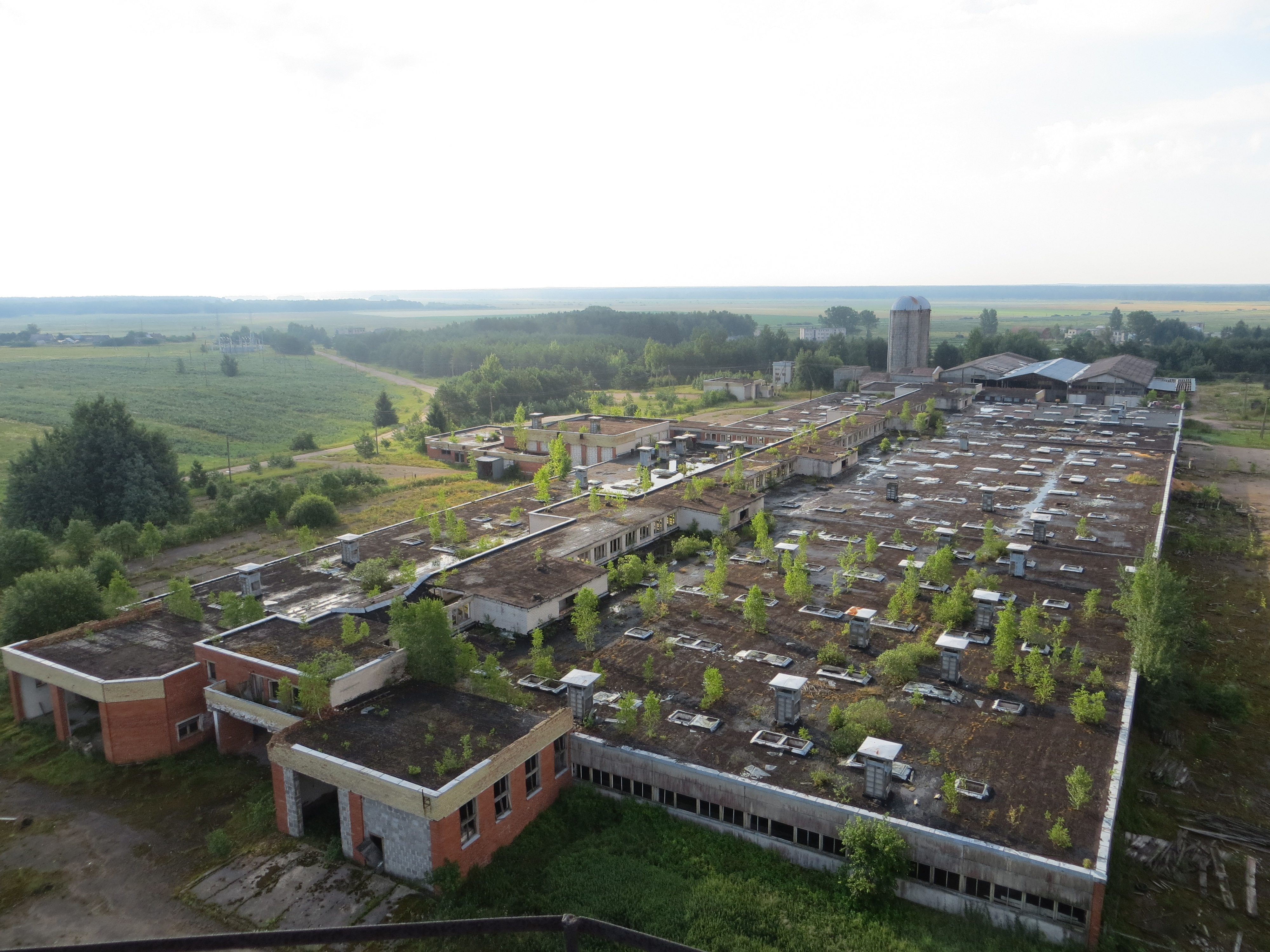 Madžiūnai, Lithuania